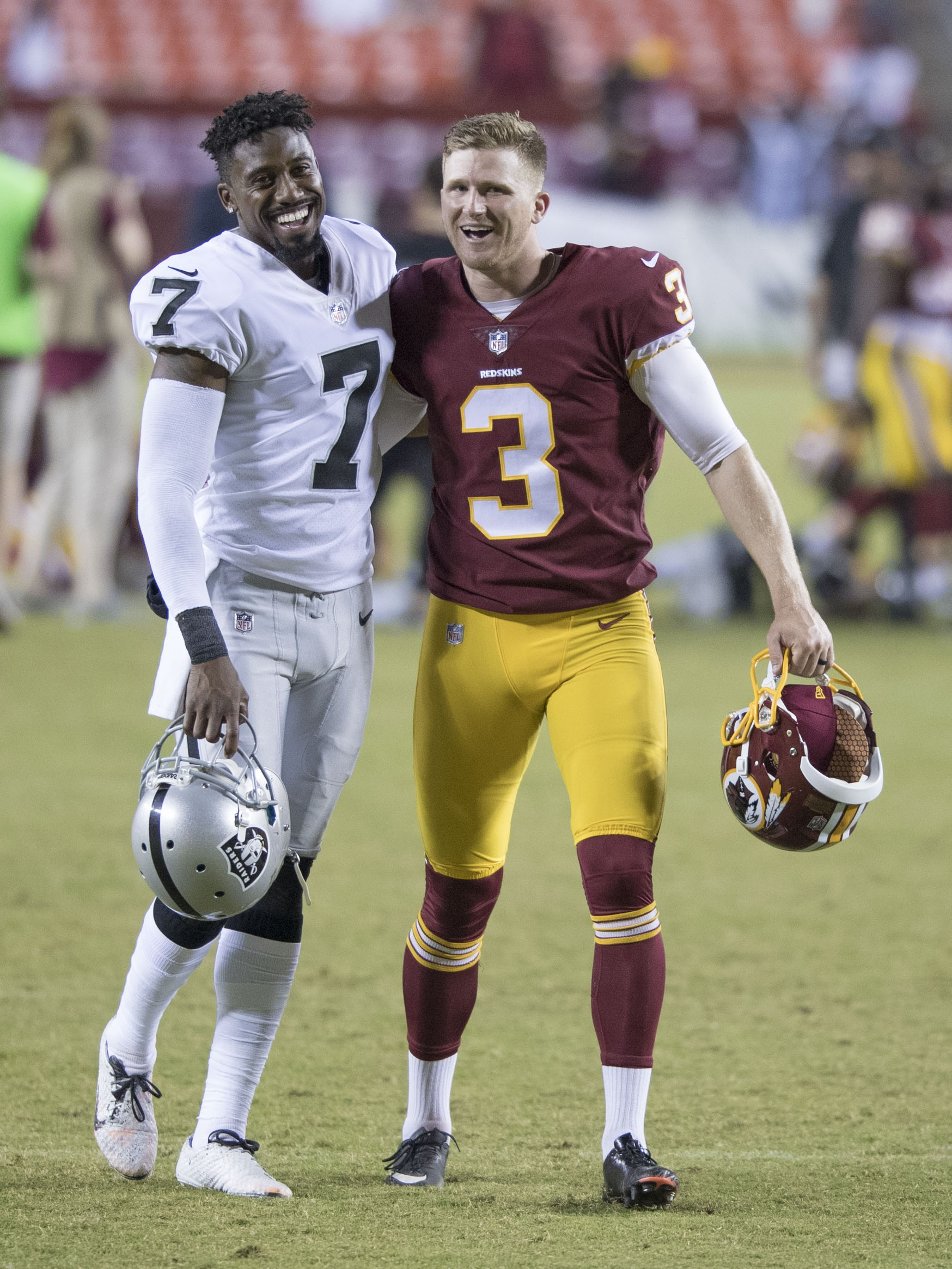 Raiders at Redskins 9/24/17